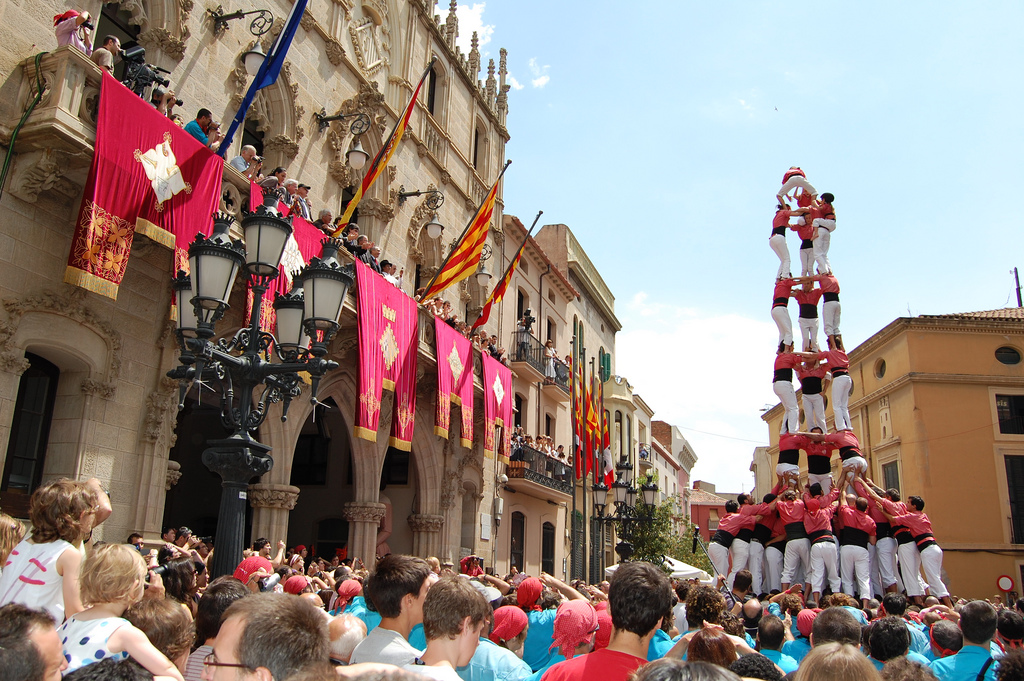 Castellers de la Colla Vella dels Xiquets de Valls, fet un 3 de 9 amb folre davant l'Ajuntament de Terrassa (Vallès Occidental, Catalunya)